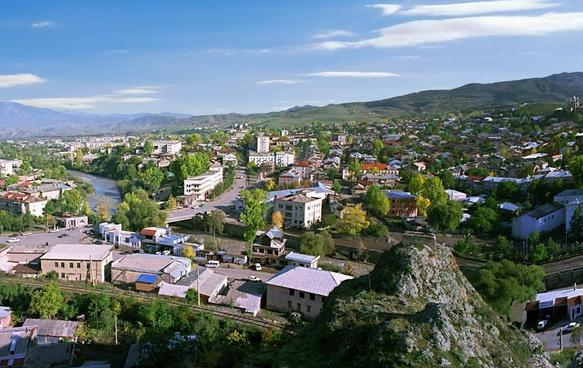 Akhaltsikhe, Georgia.